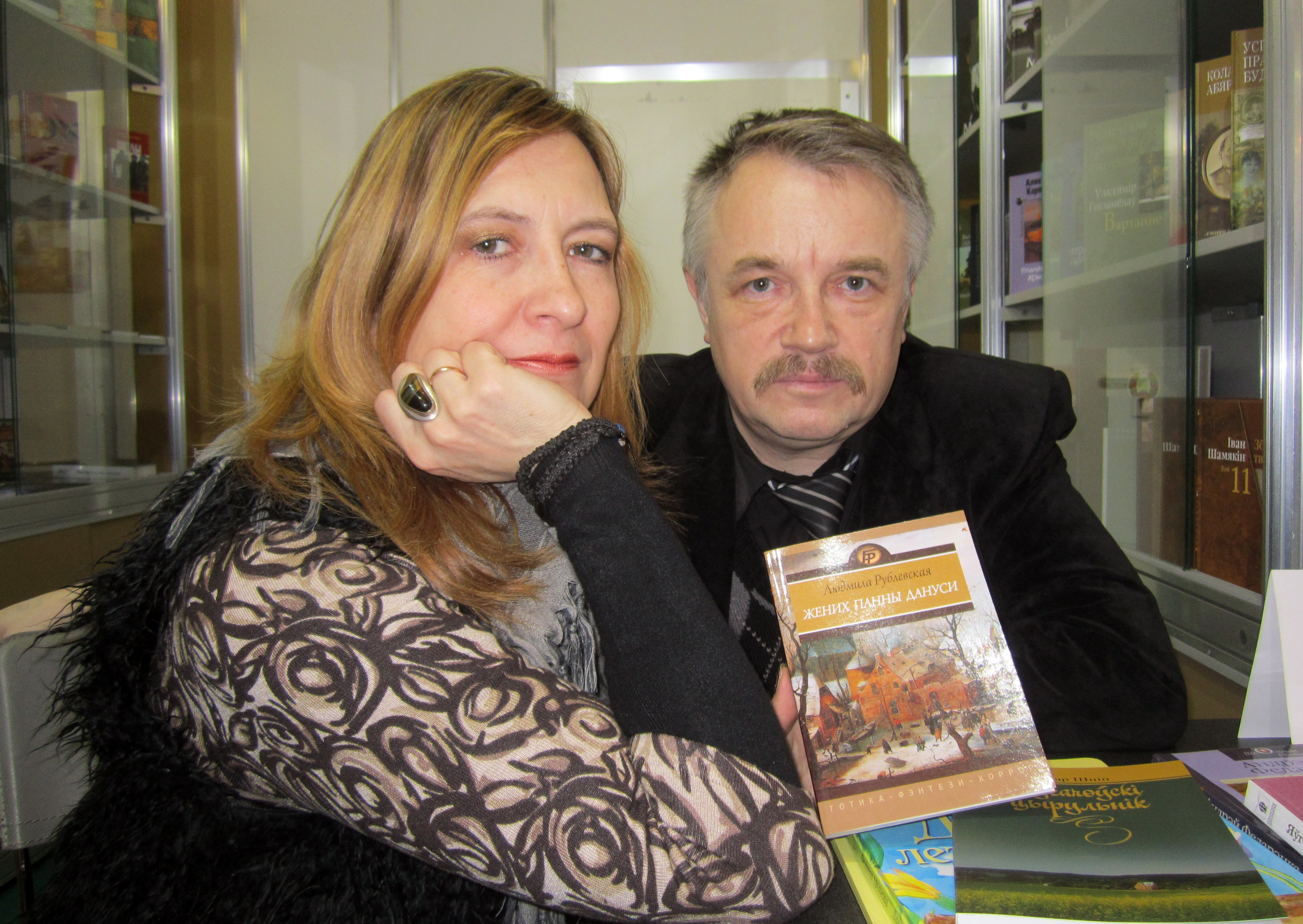 Беларускія пісьменнікі Людміла Рублеўская і Віктар Шніп. XX Міжнародная кніжная выстава, Мінск, 10 лютага 2013